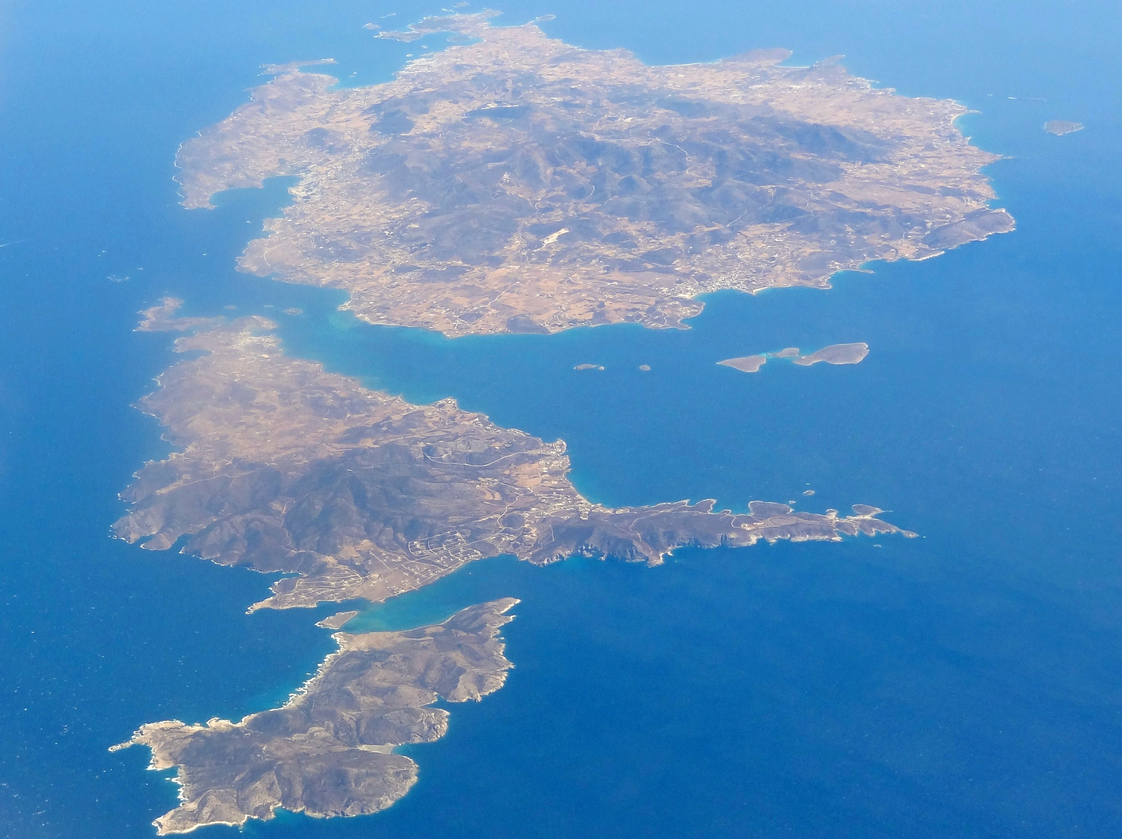 Inseln Paros (Πάρος), Andiparos (Αντίπαρος) und Despotiko (Δεσποτικό), Gemeinden Paros und Andiparos, Kykladen, südliche Ägäis, Griechenland